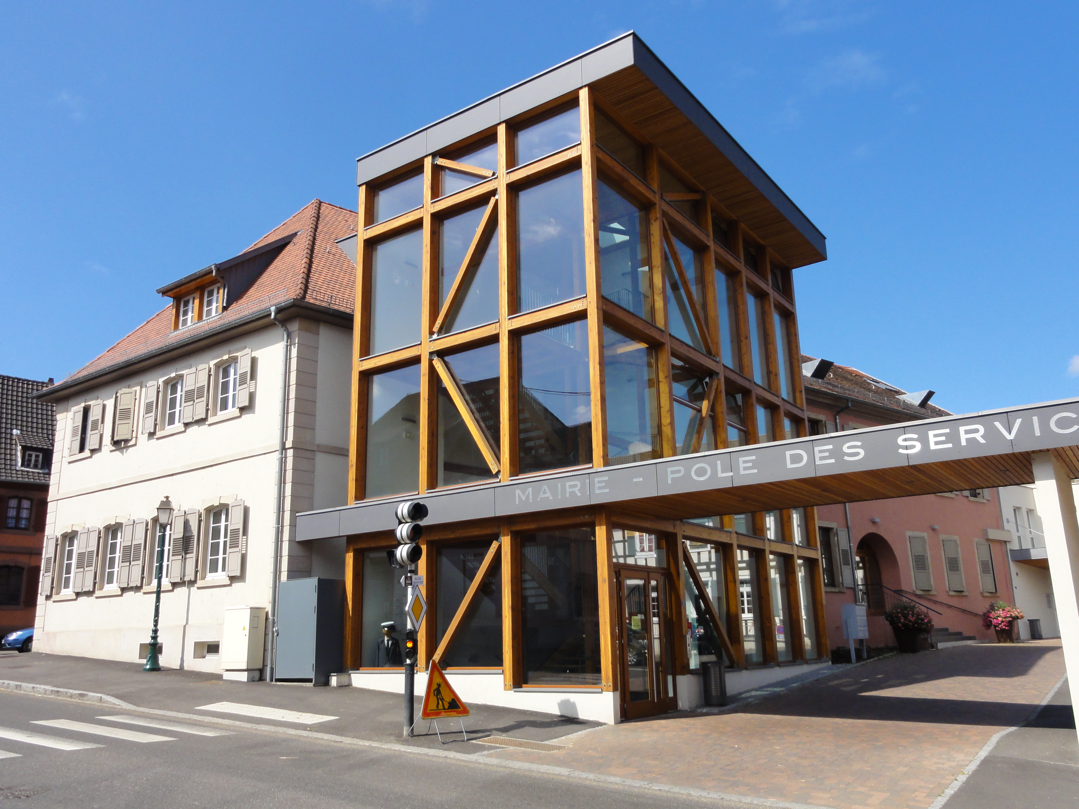 Alsace, Bas-Rhin, Soultz-sous-Forêts, Hôtel de ville (XIXe-XXe), 2 rue des Barons-de-Fleckenstein.